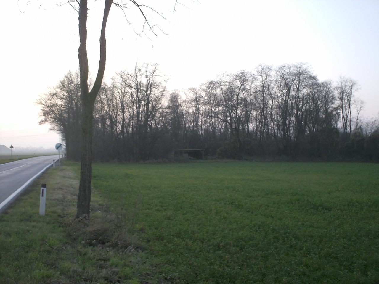 Das Wäldchen Weingartl oder Remise bei Zwentendorf an der Donau/NÖ, hier stand einst ein Römerkastell und später eine mittelalterliche Festungsanlage (Motte), Blick aus Südost.